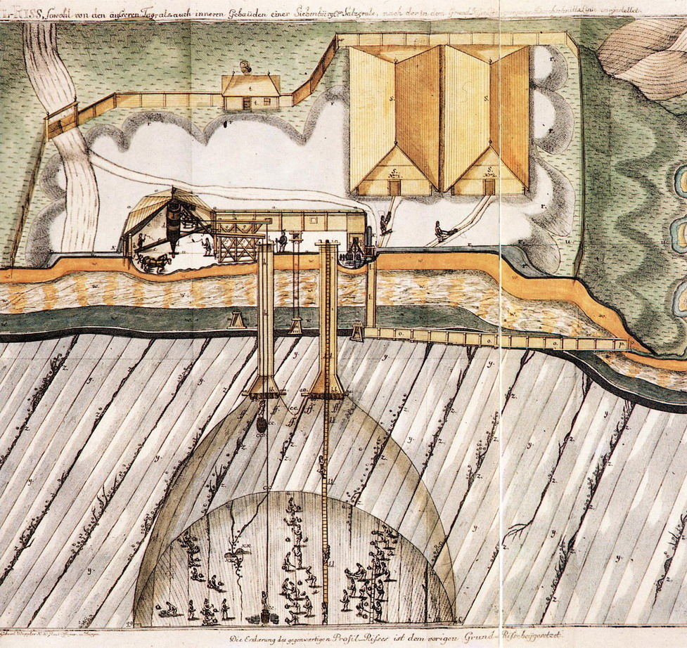 Metoda veche de exploatare a sării geme în Transilvania (scanul unei vechi imagini din anul 1780).